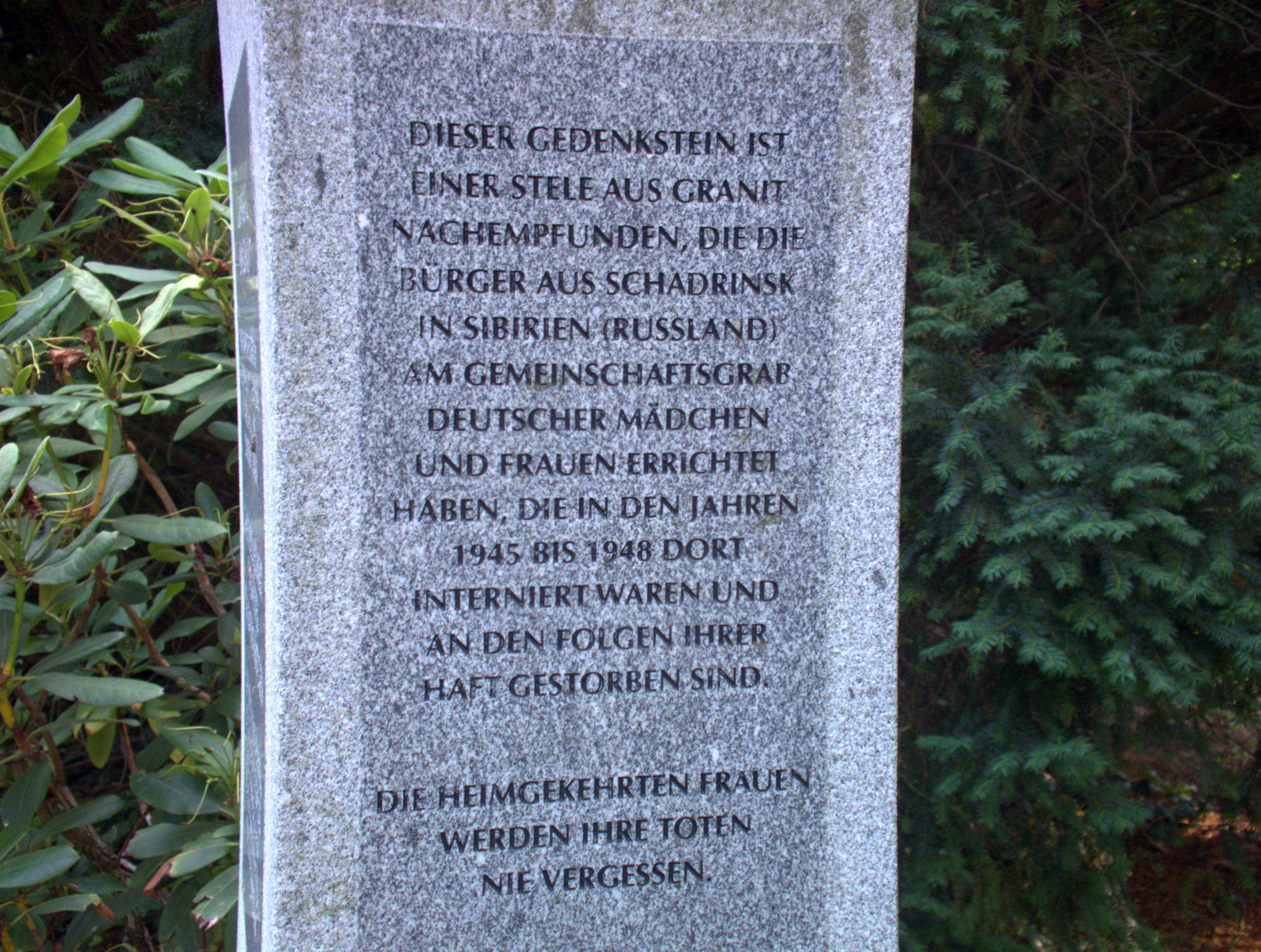 Den Opfern v. Vertreibung, Verschleppung, Vergewaltigung u. ZwangsarbeitThis is a photograph of an architectural monument.